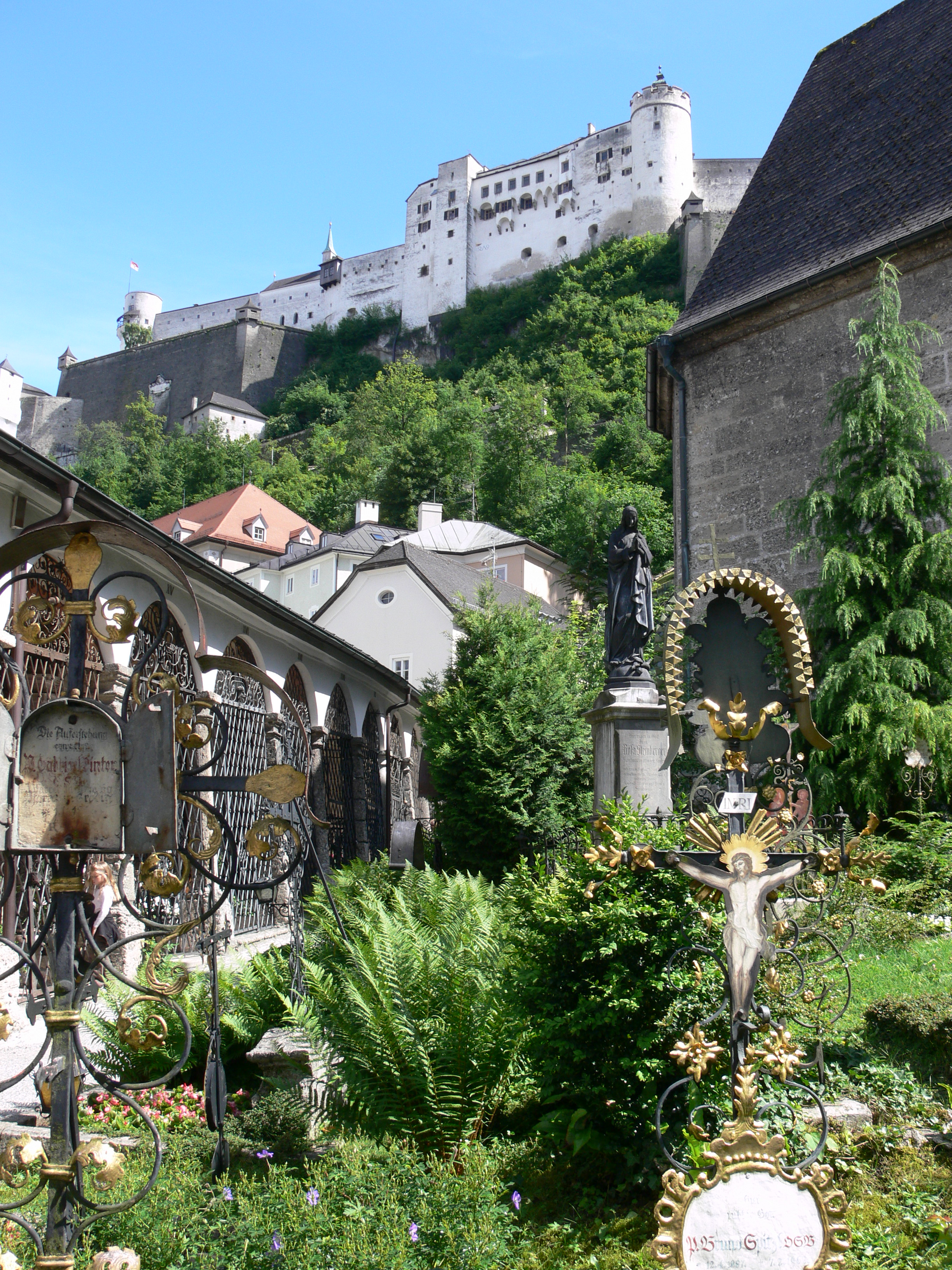 Salzburg, Petersfriedhof